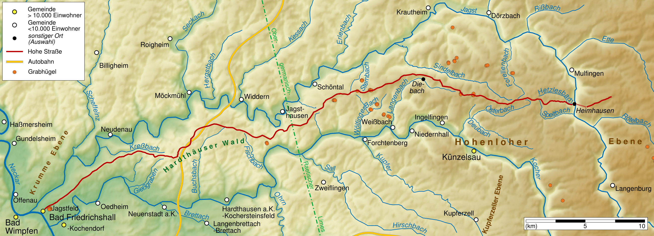 Karte der Hohen Straße zwischen Kocher und Jagst.